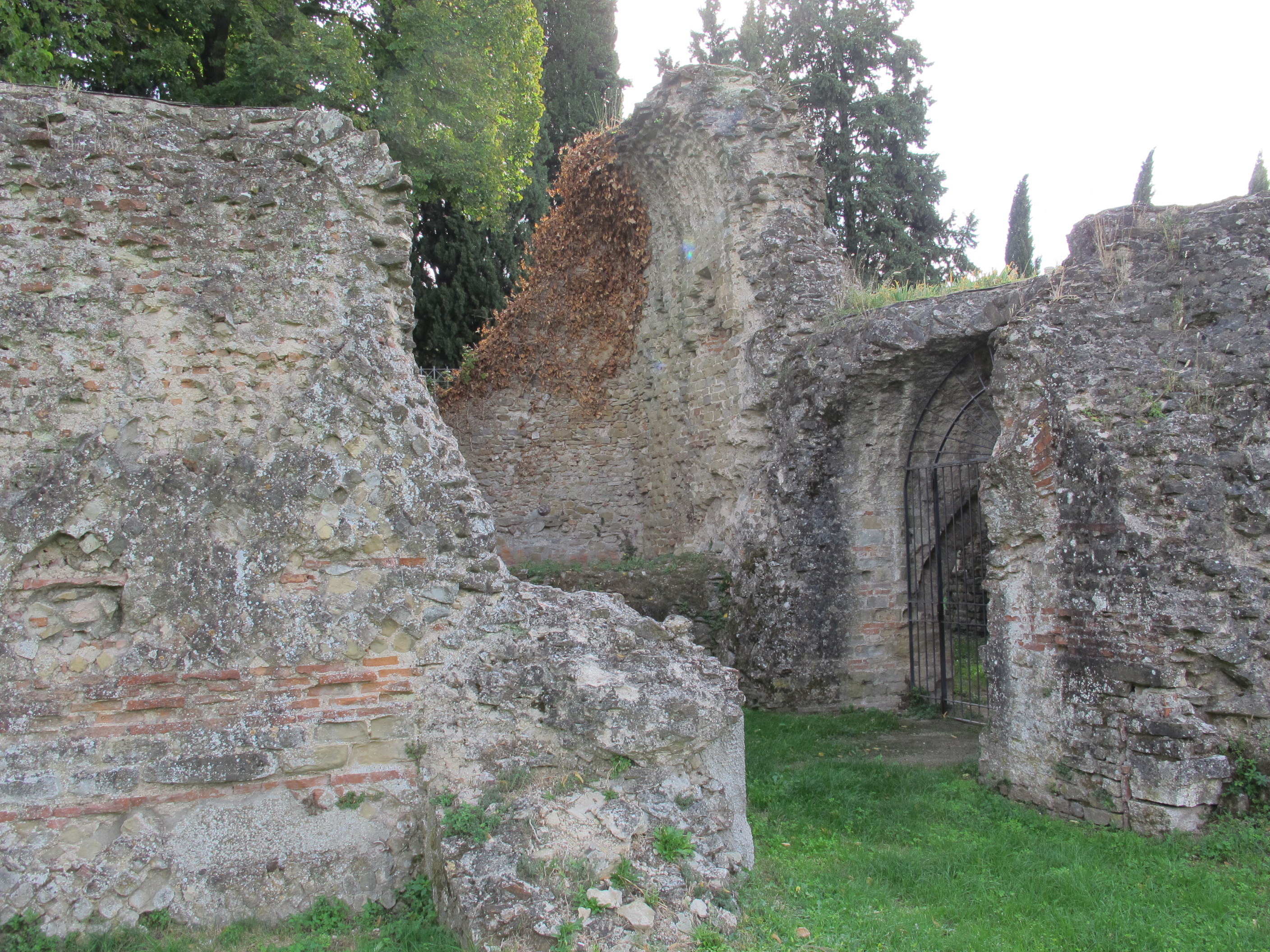 Anfiteatro romano di Arezzo - MIBAC This is a photo of a monument which is part of cultural heritage of Italy.